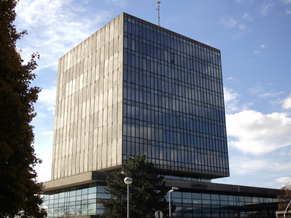 Zgrada Kockica u Zagrebu